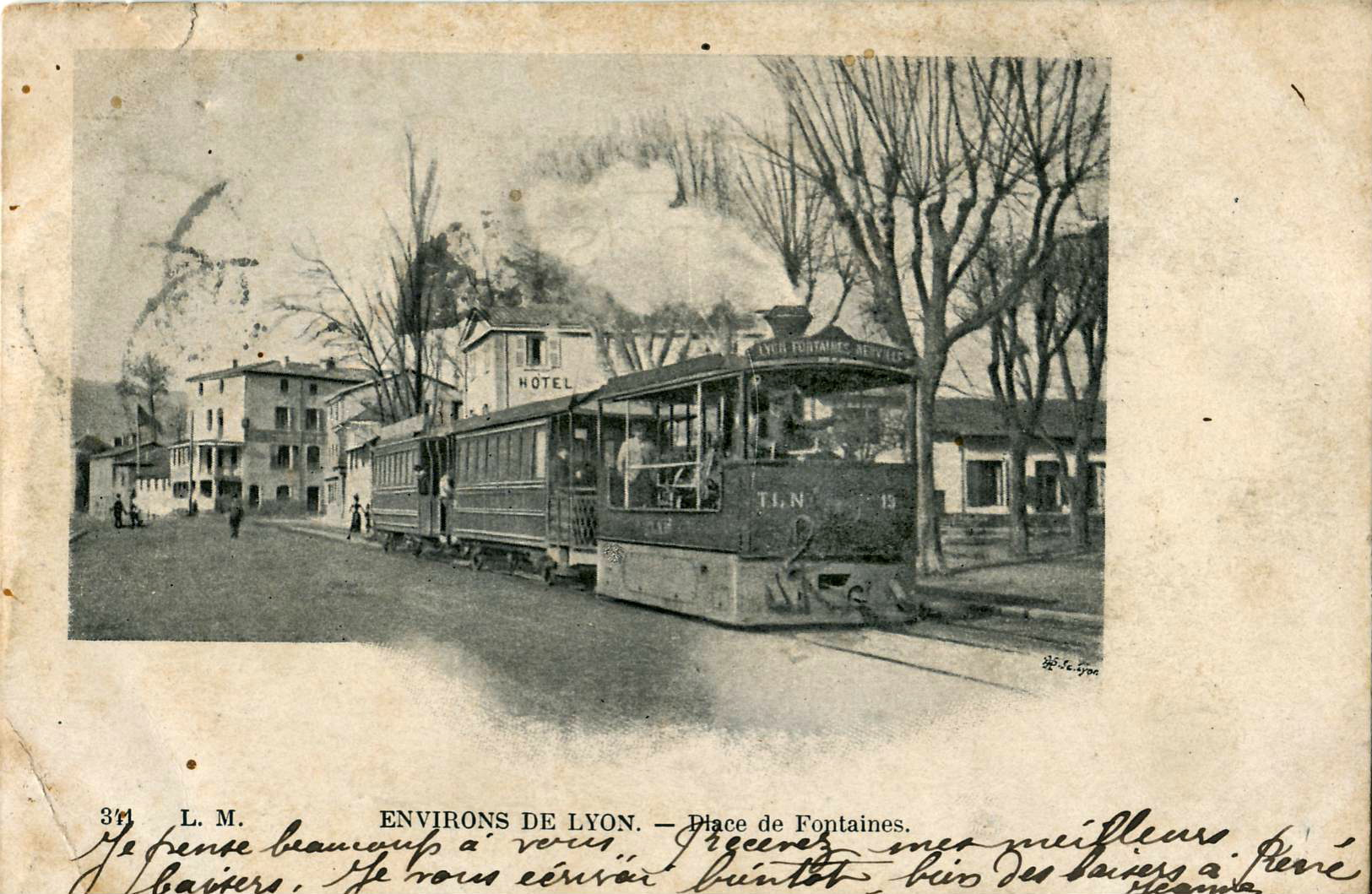 Carte postale ancienne éditée par LM, série Environs de Lyon, n°341 :Place des Fontaines